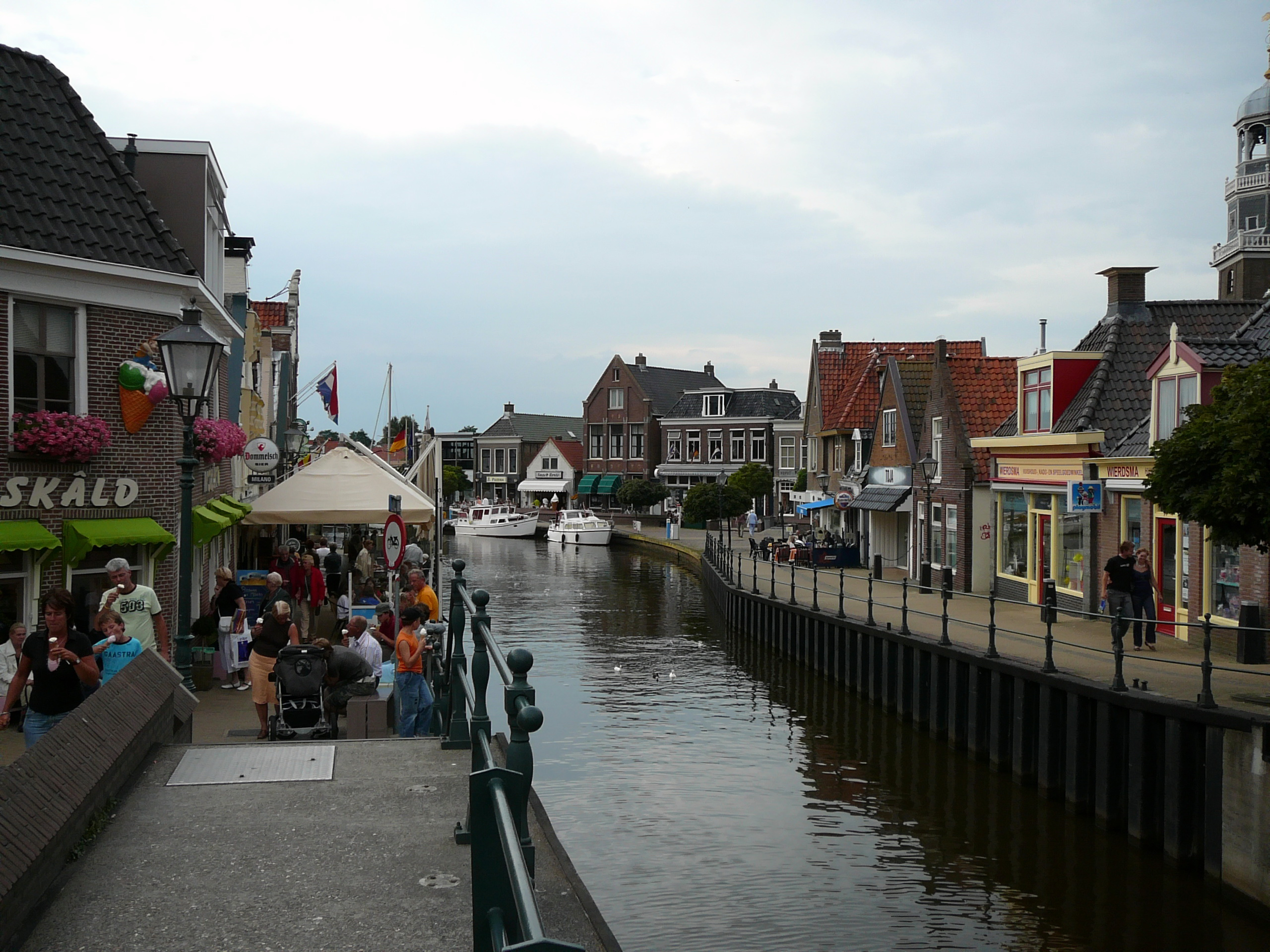 lemmer (12)